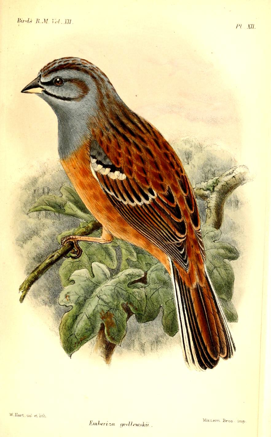 Emberiza godlweski, Godlewski's Bunting